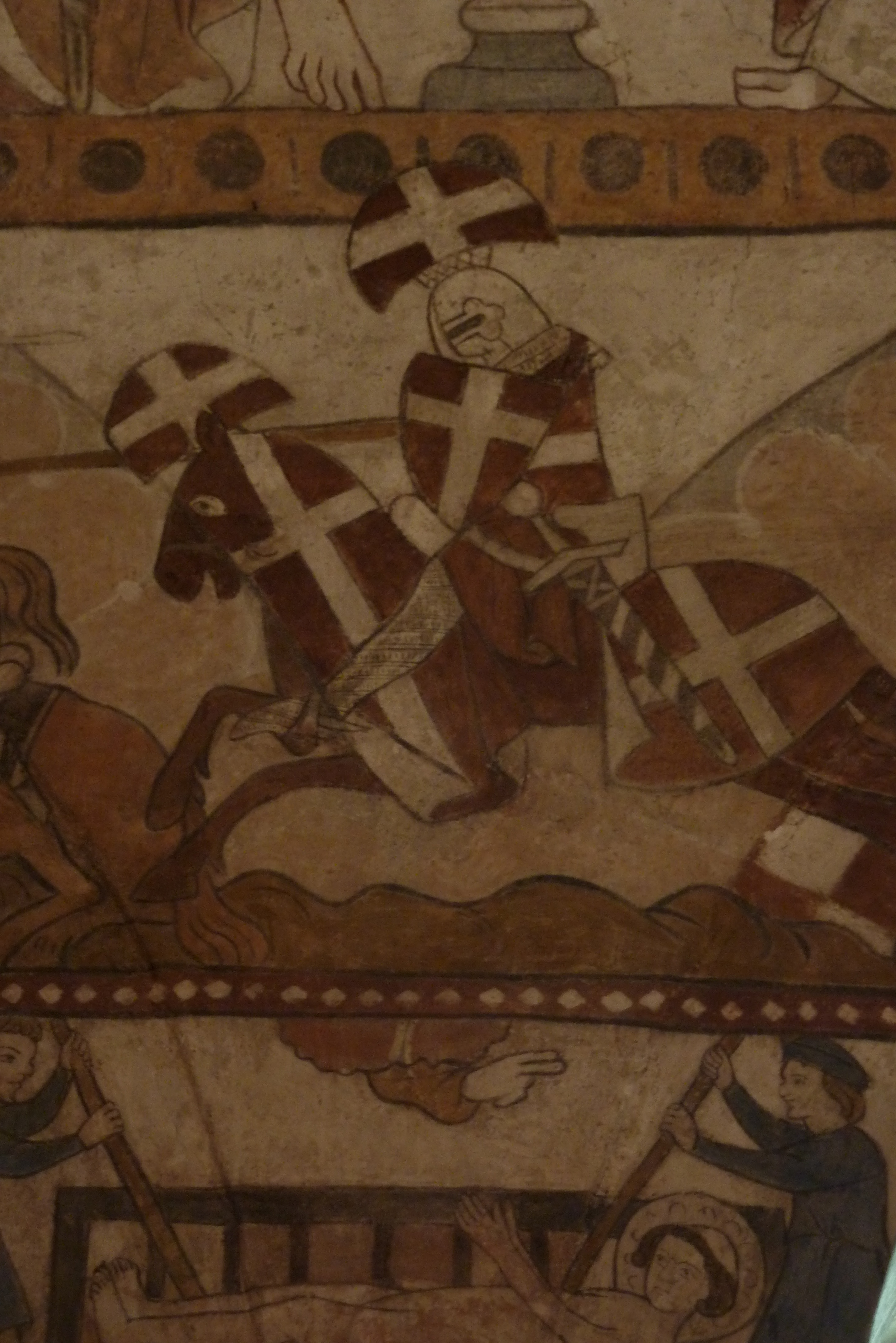 Katholische Pfarrkirche St. Cyriakus in Niedermendig, Wandmalerei um 1300, Ritter